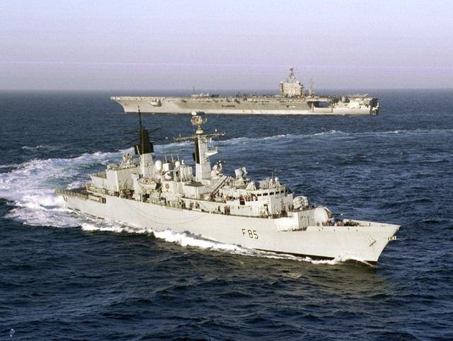 Britische Fregatte HMS Cumberland (Broadsword-Klasse) mit dem US-Flugzeugträger Eisenhower im Persischen Golf 1998.